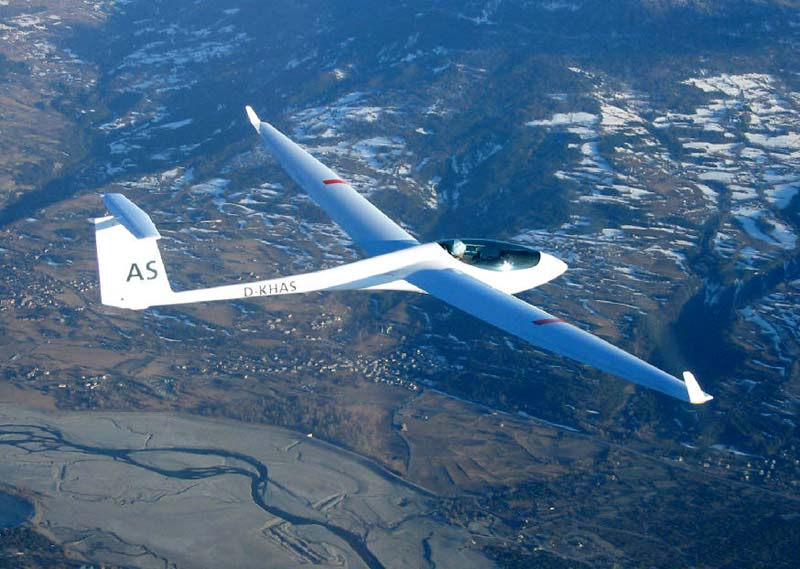 ASW 24